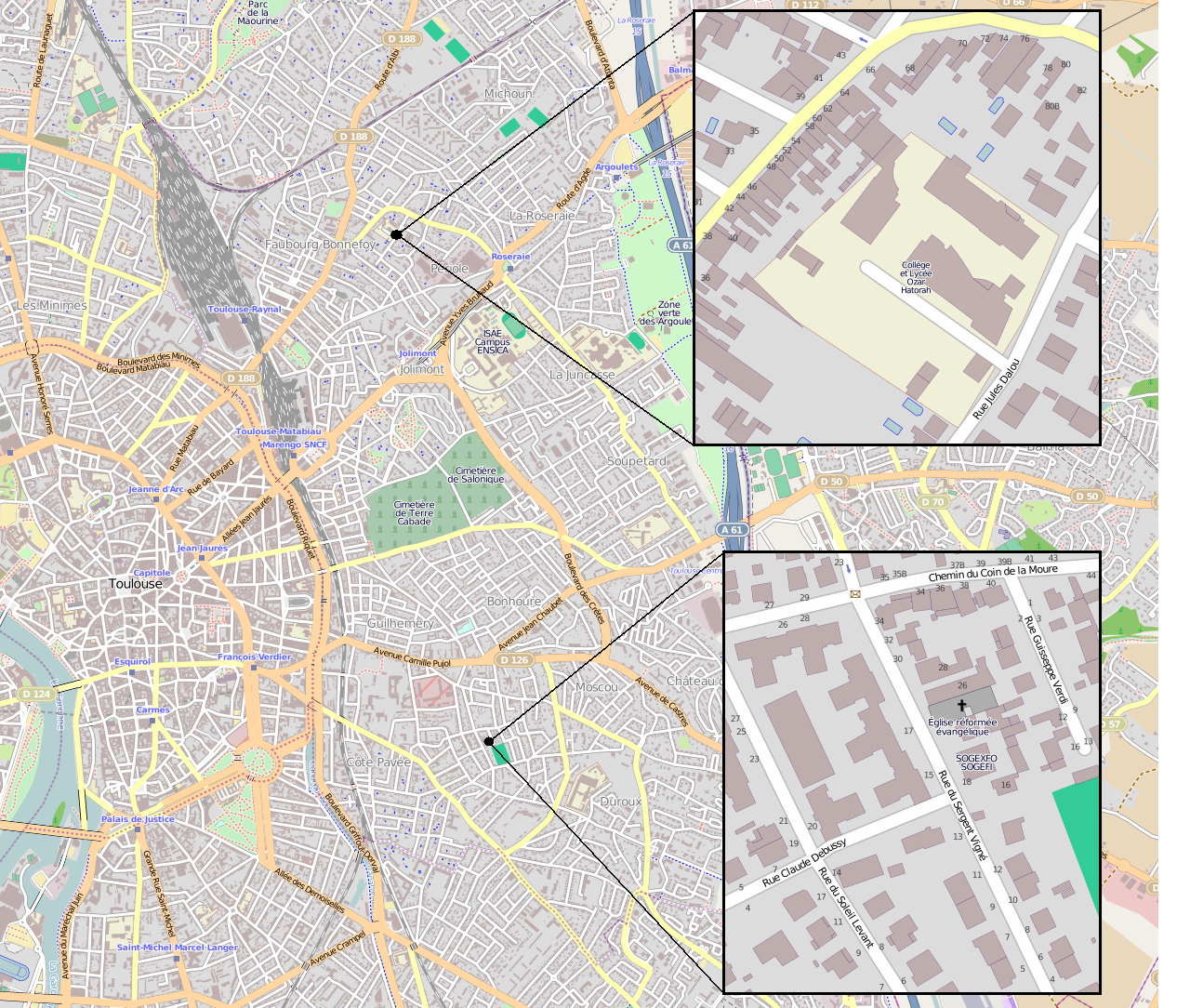 Lagekarte des Attentats auf eine jüdische Schule einschließlich des Wohnorts des mutmaßlichen Attentäters